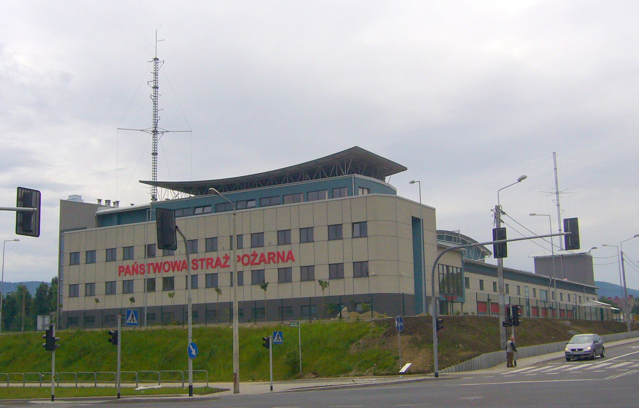 Feuerwehr in Bielitz-Biala